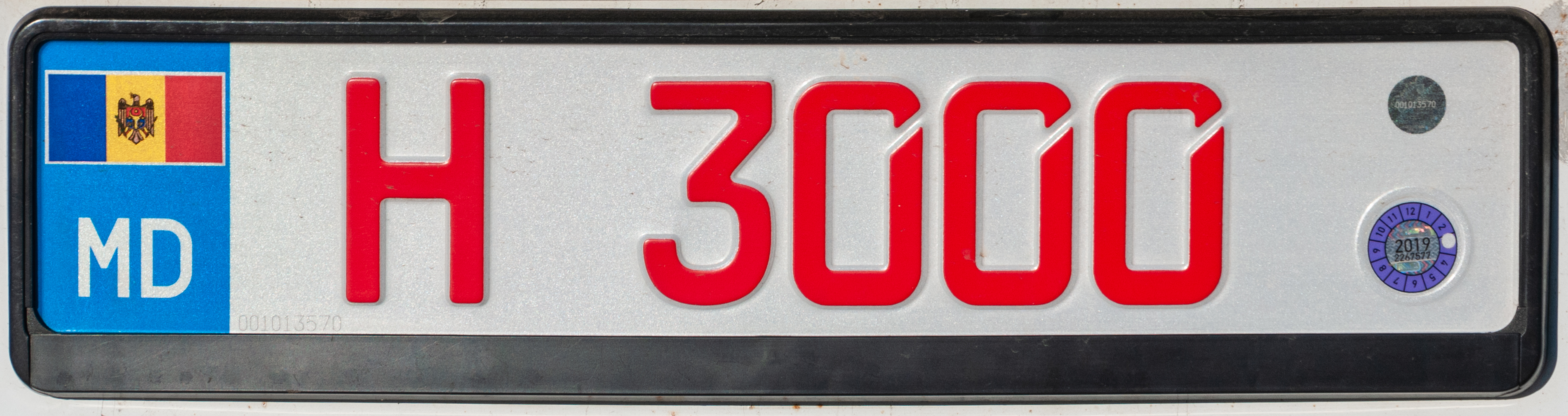 Tiraspol, Pridnestrowien, moldawisches Nummernschild